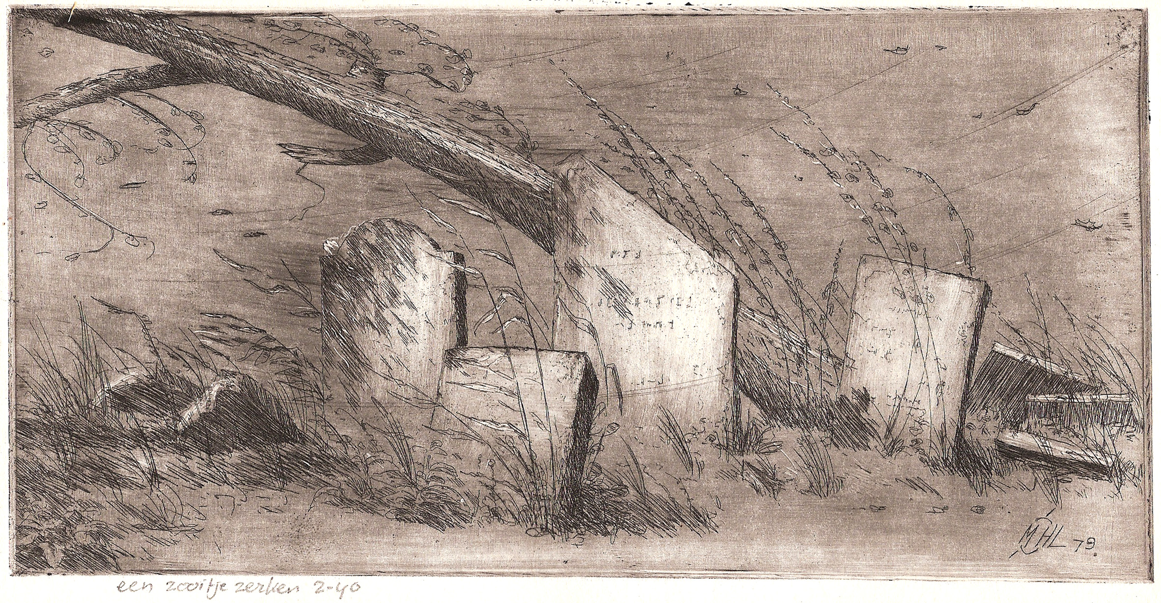 Schilderij grafzerken.